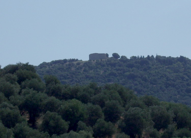 Veduta panoramica con il Tino di Moscona (Grosseto)